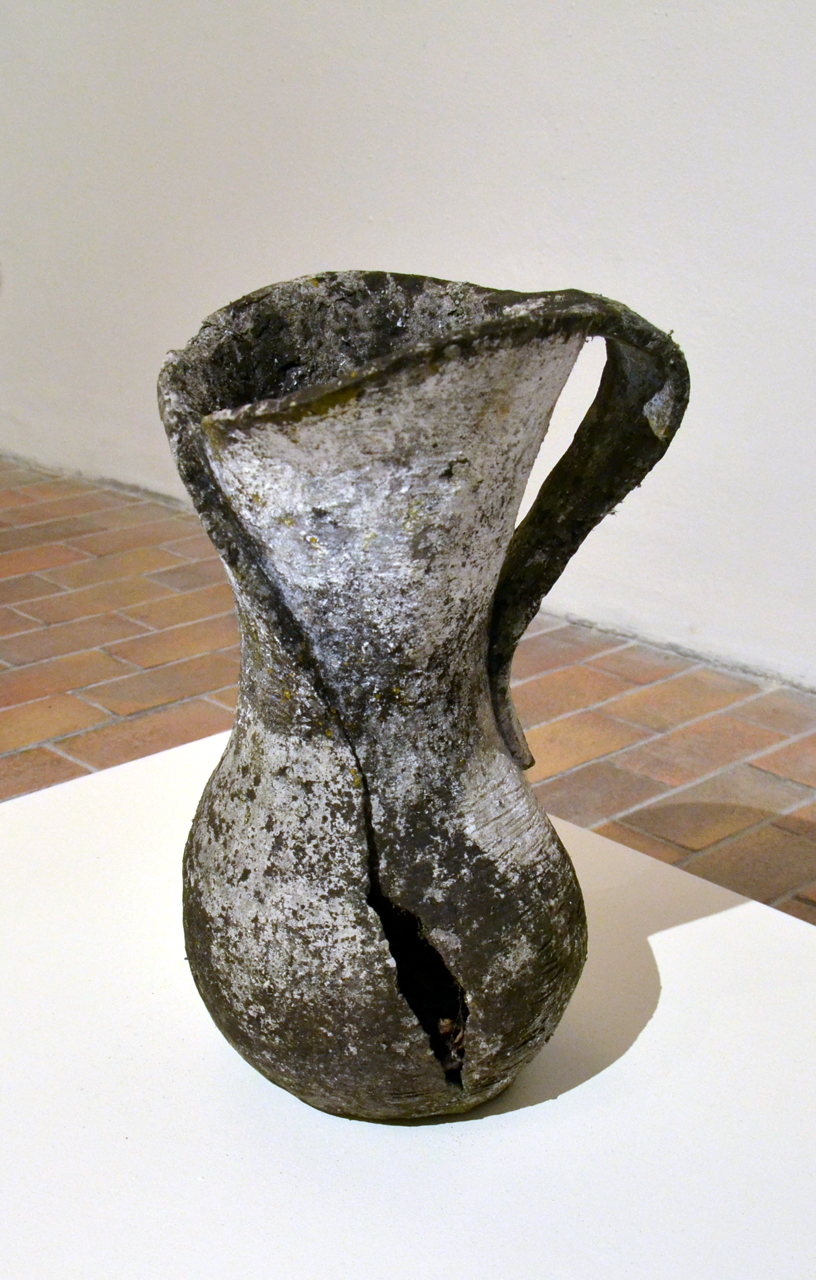 Stanislav Podhrázský, Džbán